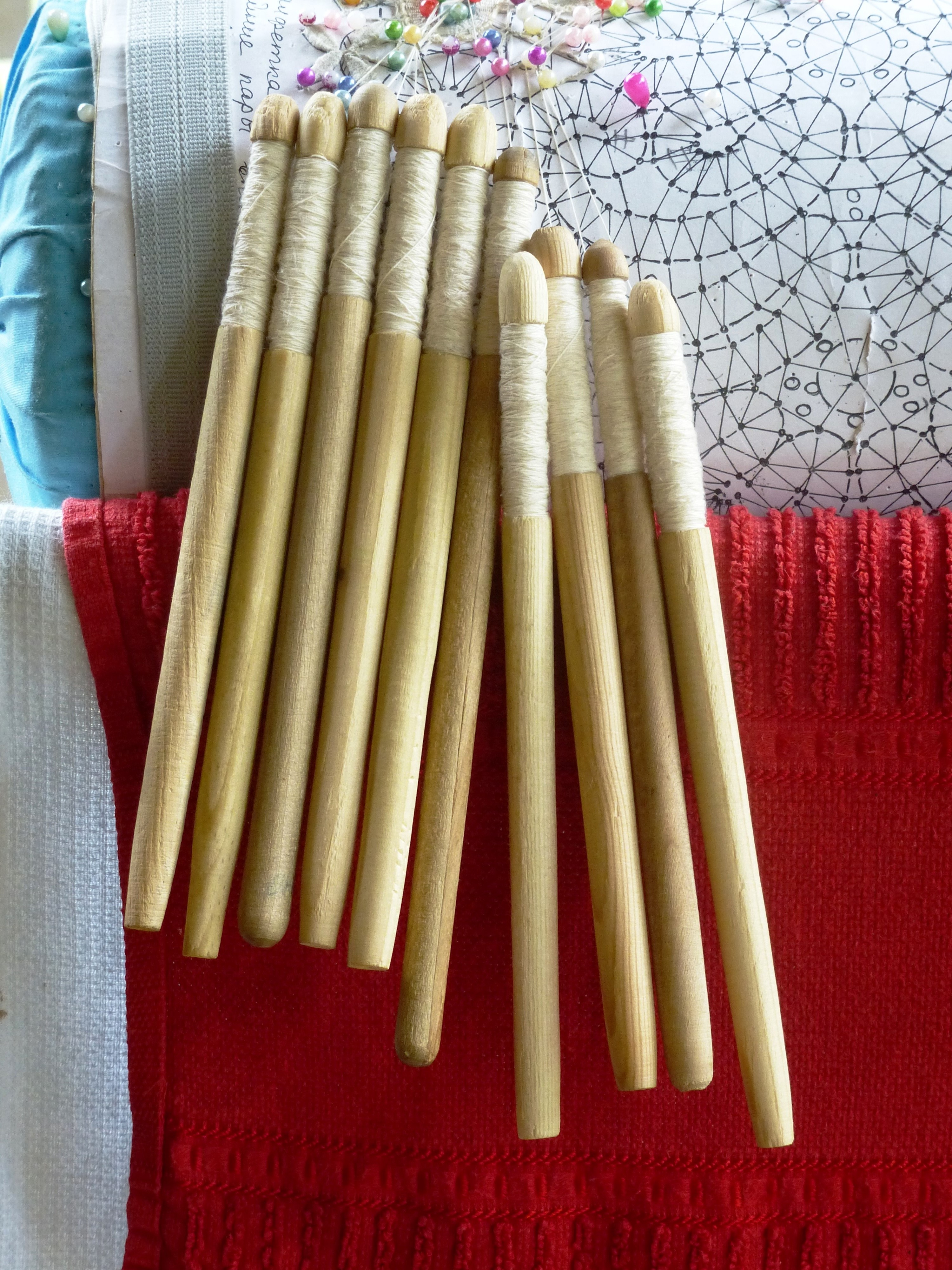 Коклюшки-инструмент для кружевоплетения